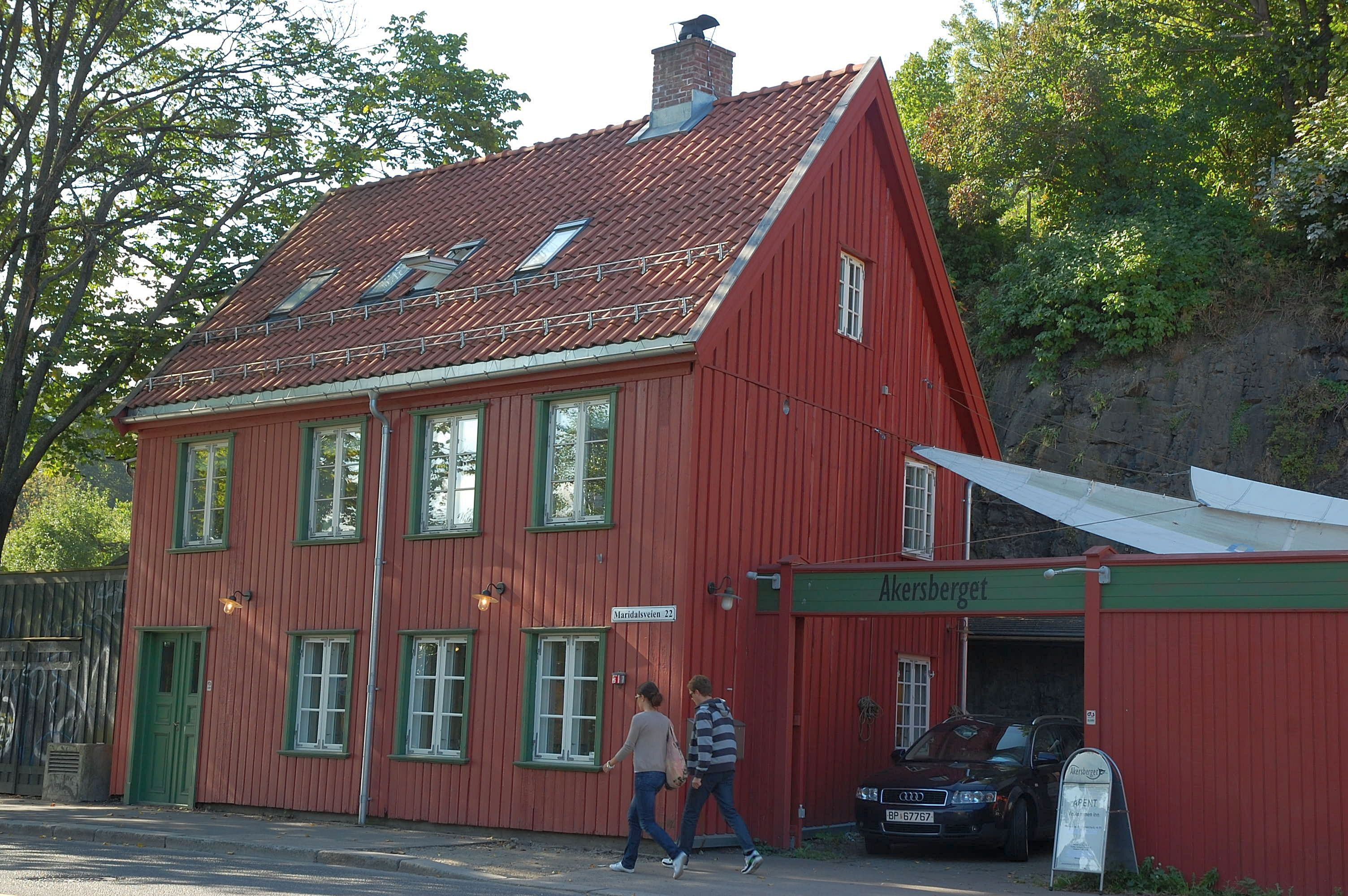 Maridalsveien 22, Restaurant Akersberget, Oslo